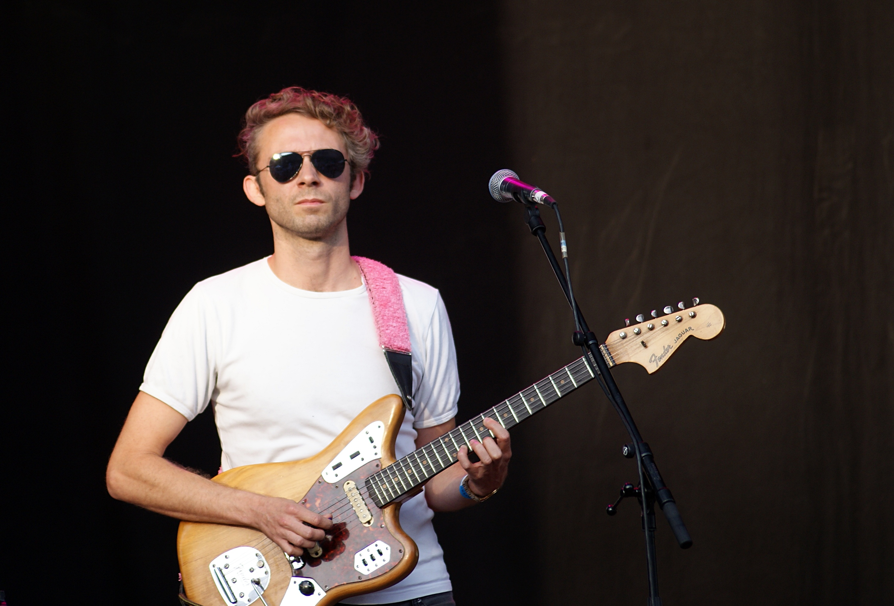 I Got You On Tape på Roskildescenen på Stockholms Kulturfestival